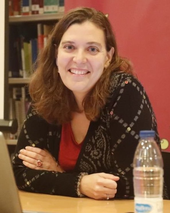 Faladoiro As viúvas de vivos na cultura e literatura galega no Centro de documentación e recursos feministas